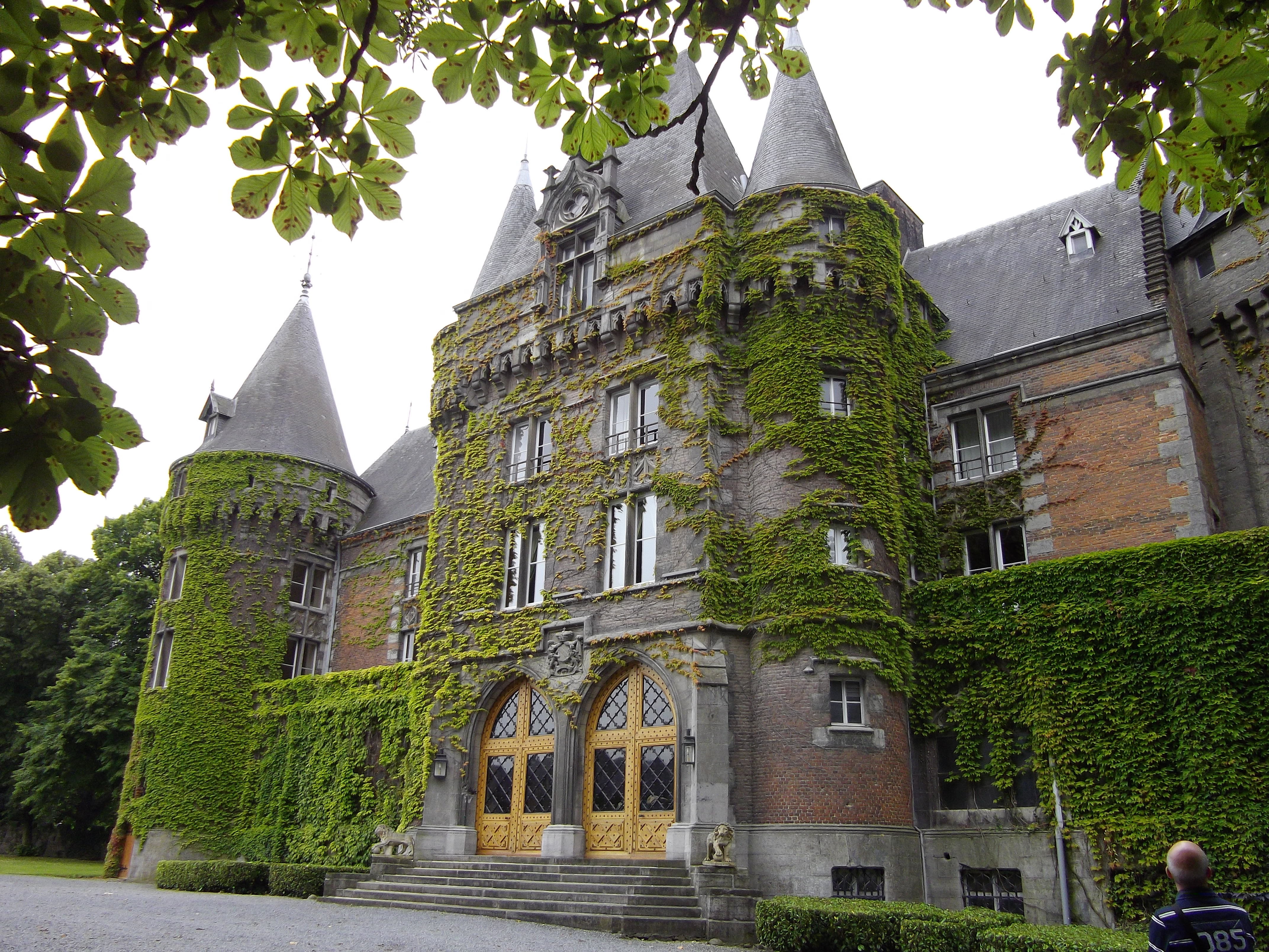 Bâtiment principal du château d'Antoing vu de la lisère des arbres du parc